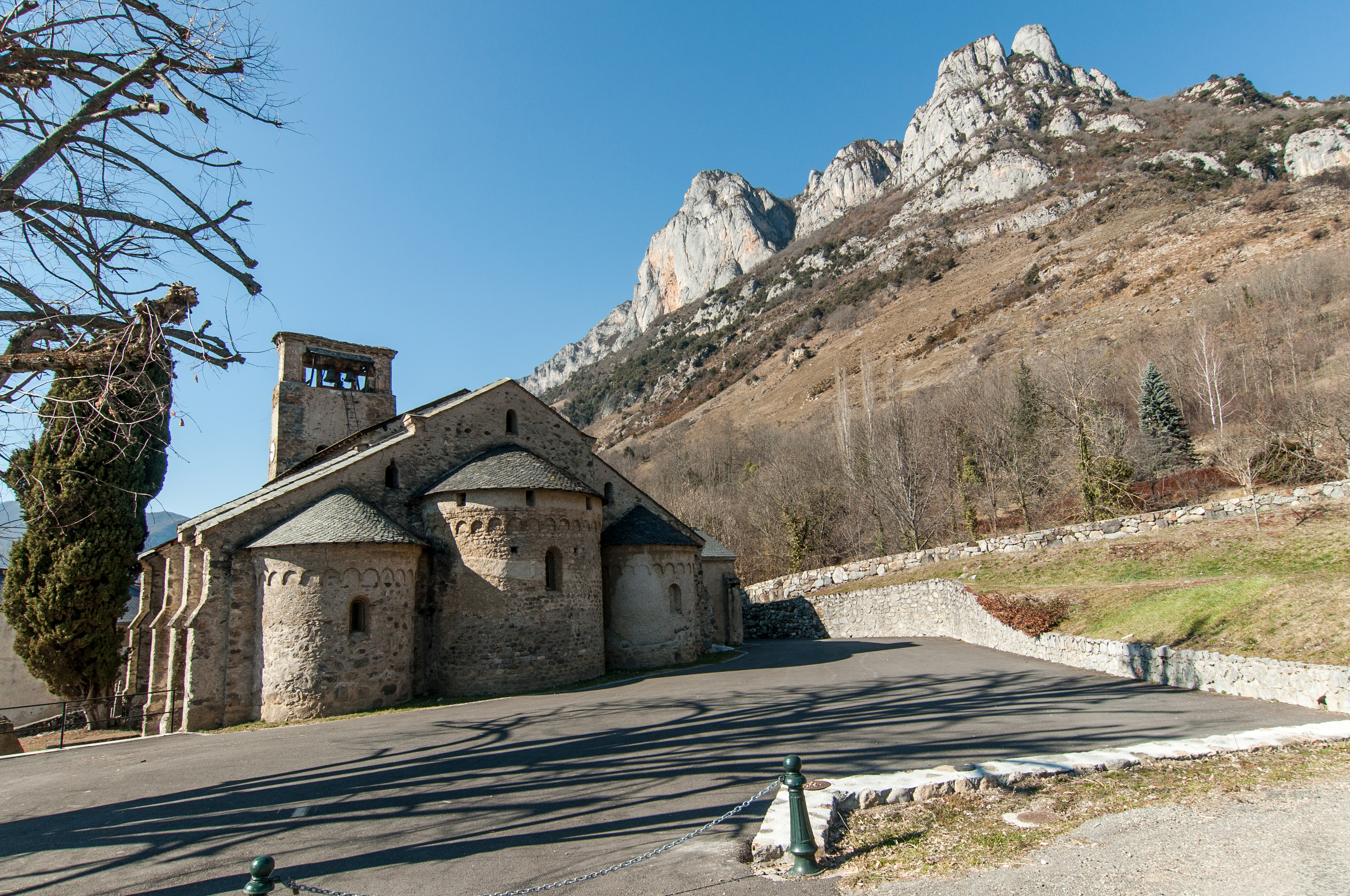 église de Verdun sur Ariège .